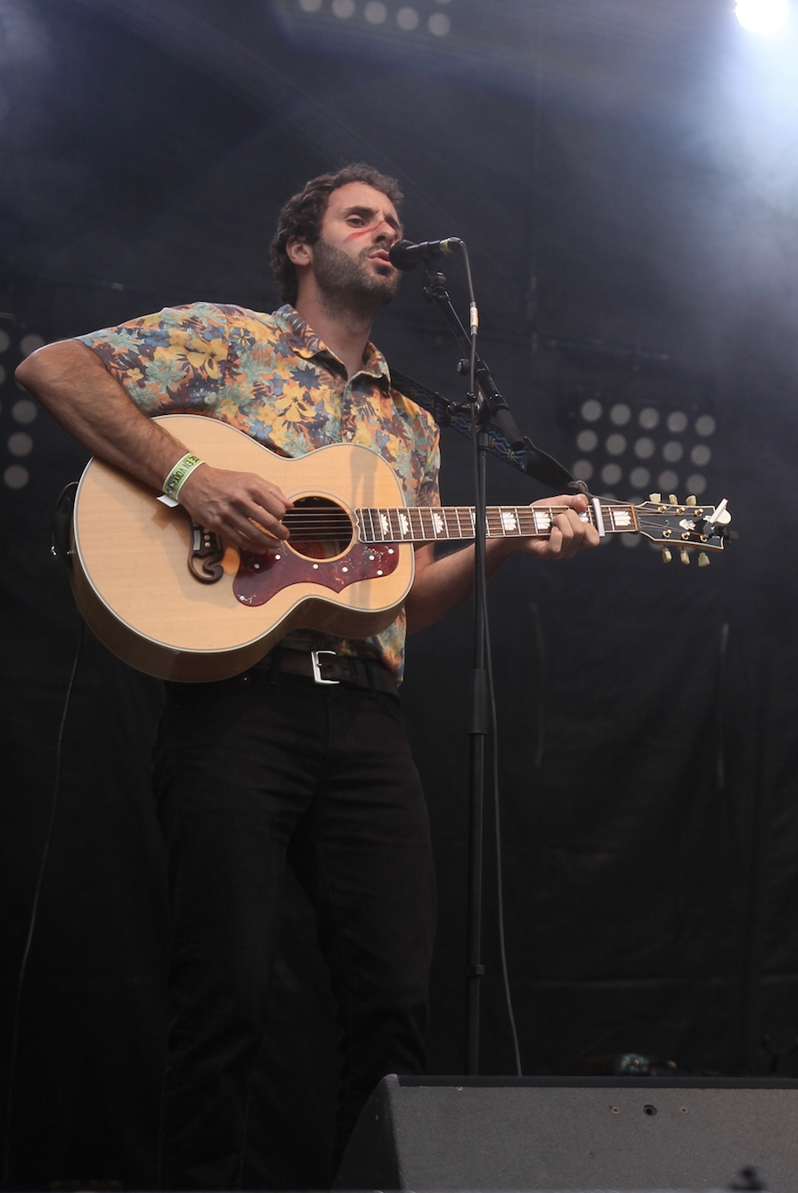 Template:Mannuel Rouzier